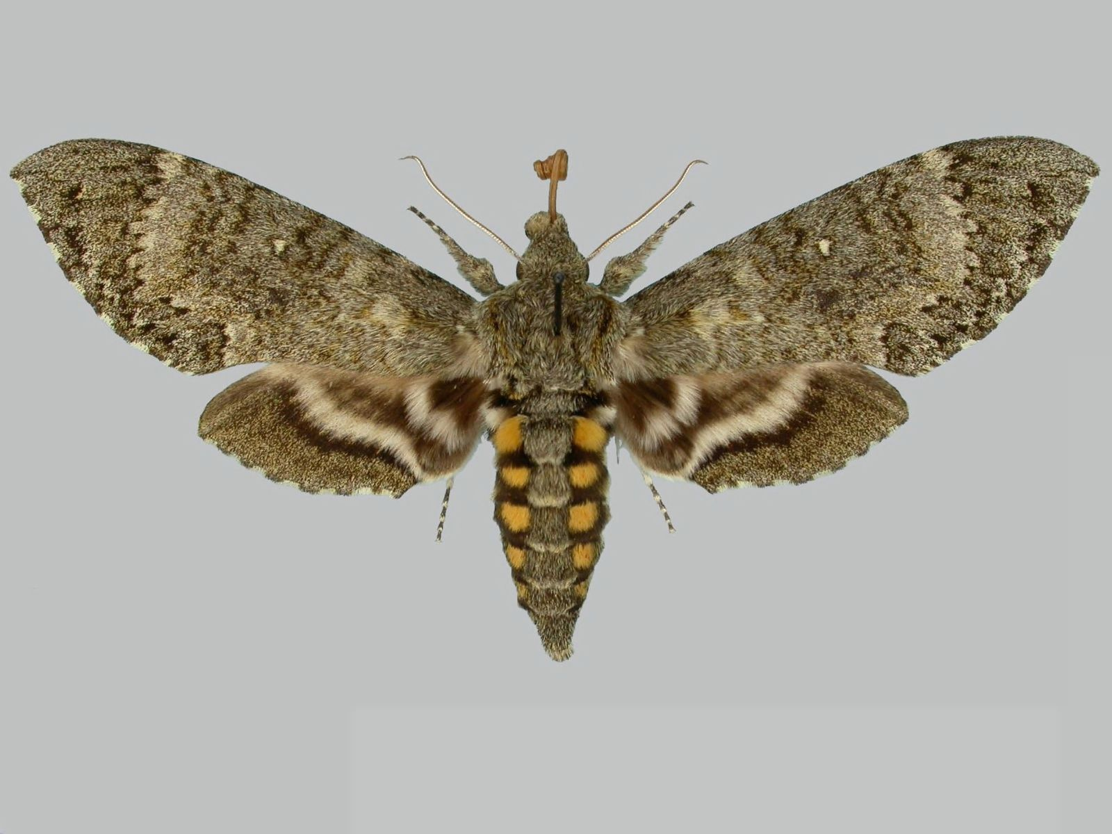 Manduca mossi, female, upperside. Peru, Lima